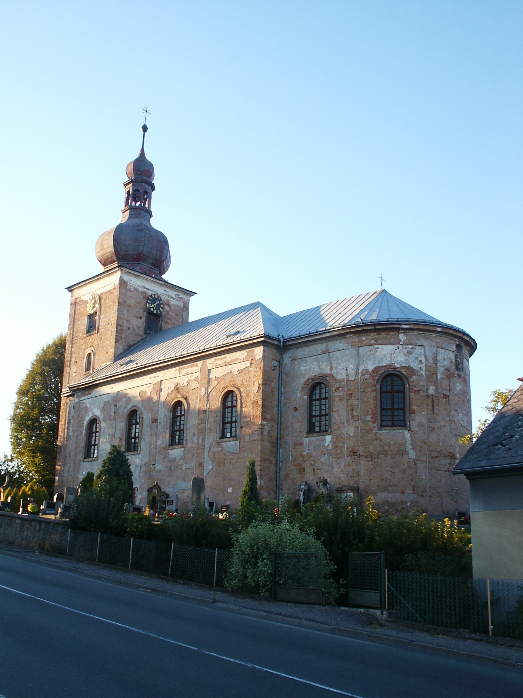 Kostel Zvěstování P. Marie, Úlibice